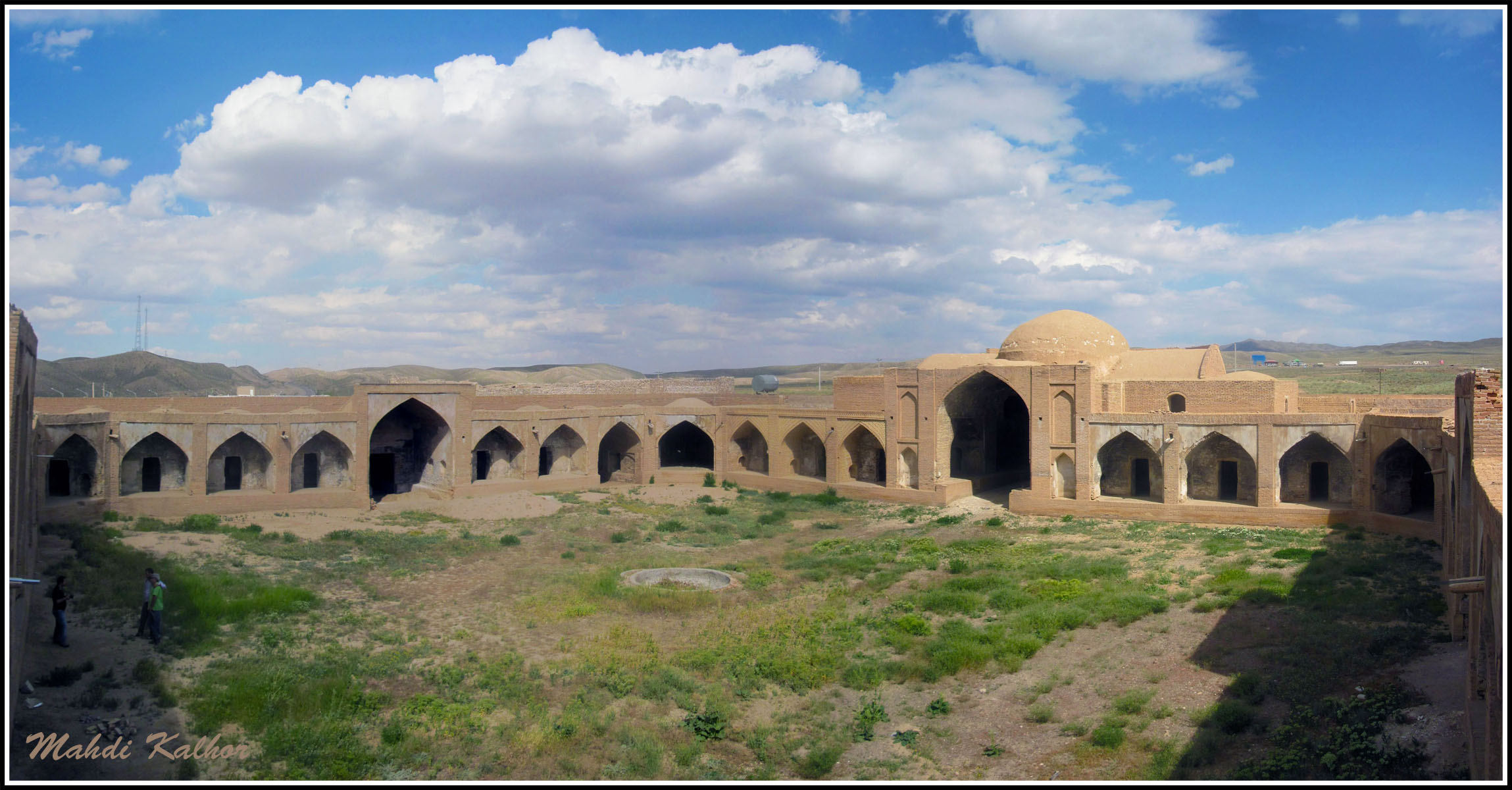 'Shah Soleimani' Caravanserai (old Inn) کاروانسرای -شاه عباسی- شاه سلیمانی آهوان